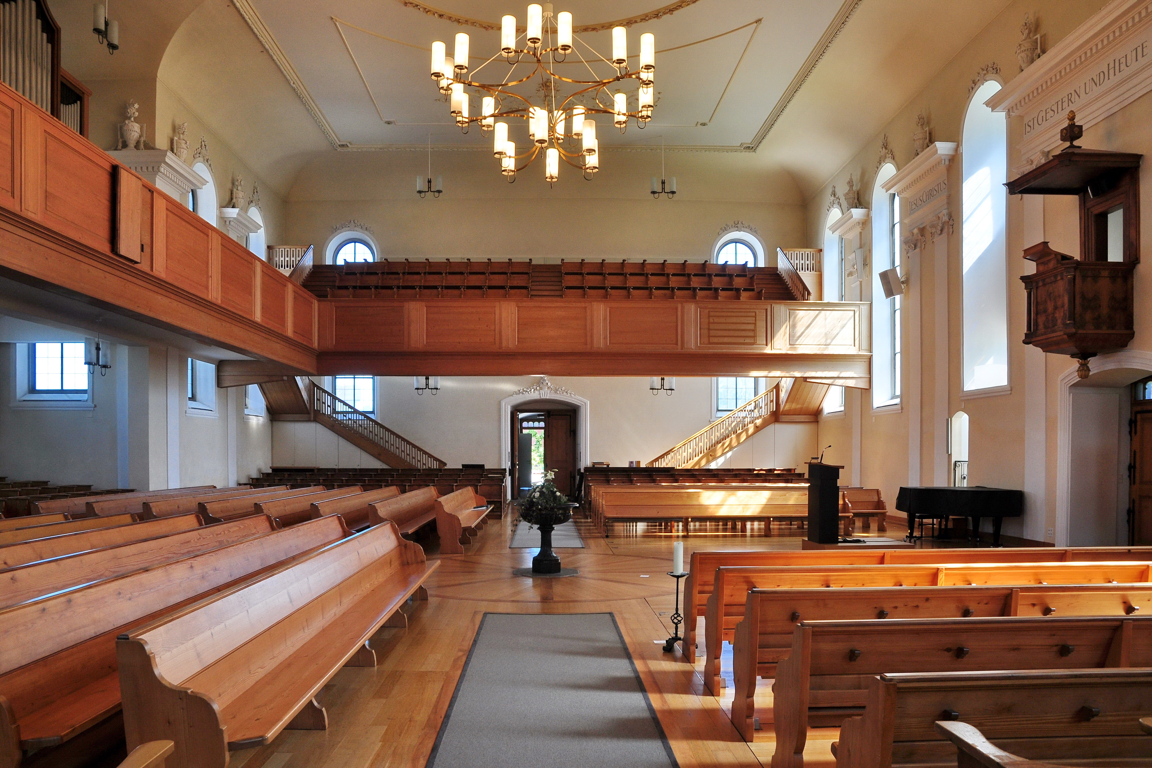 Reformierte Kirche, Bergstrasse in Gossau (Switzerland)